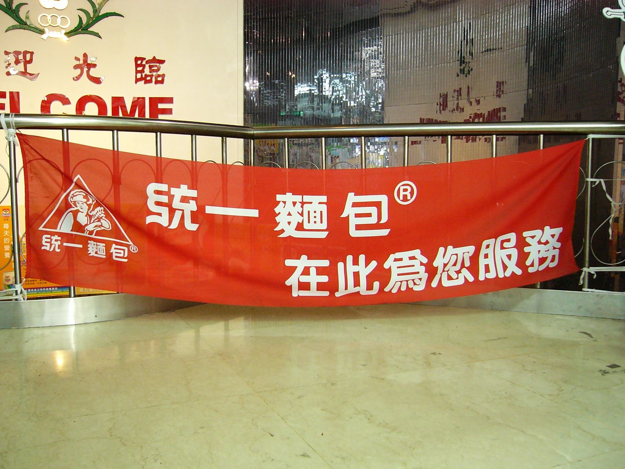 中華民國國防部文化營區一樓，往地下一樓國防部福利總處台北市中區福利站樓梯欄杆上，統一麵包廣告布條。